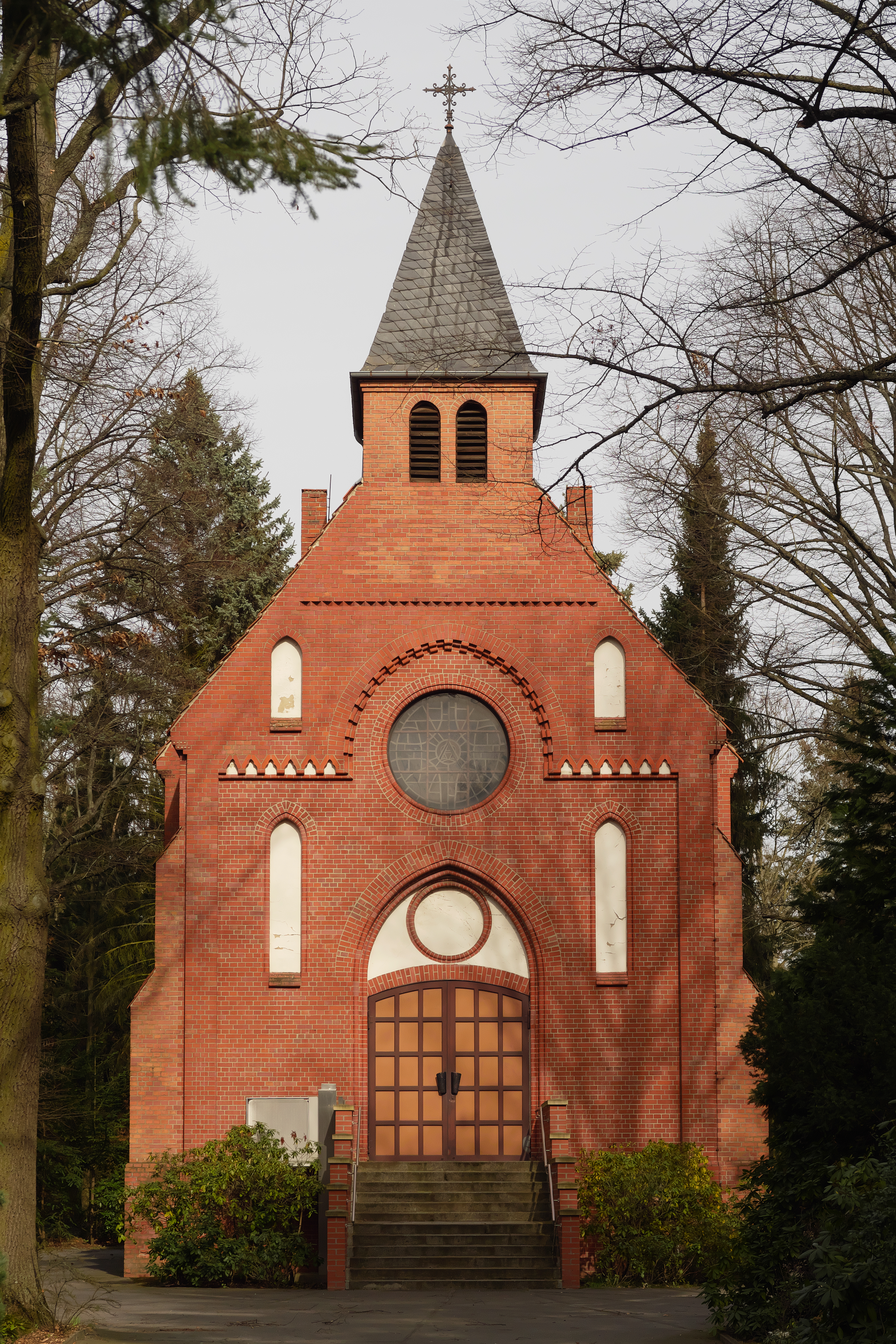 Kapelle auf dem Kirchhof Sankt Simeon und Sankt Lukas in Berlin-Britz